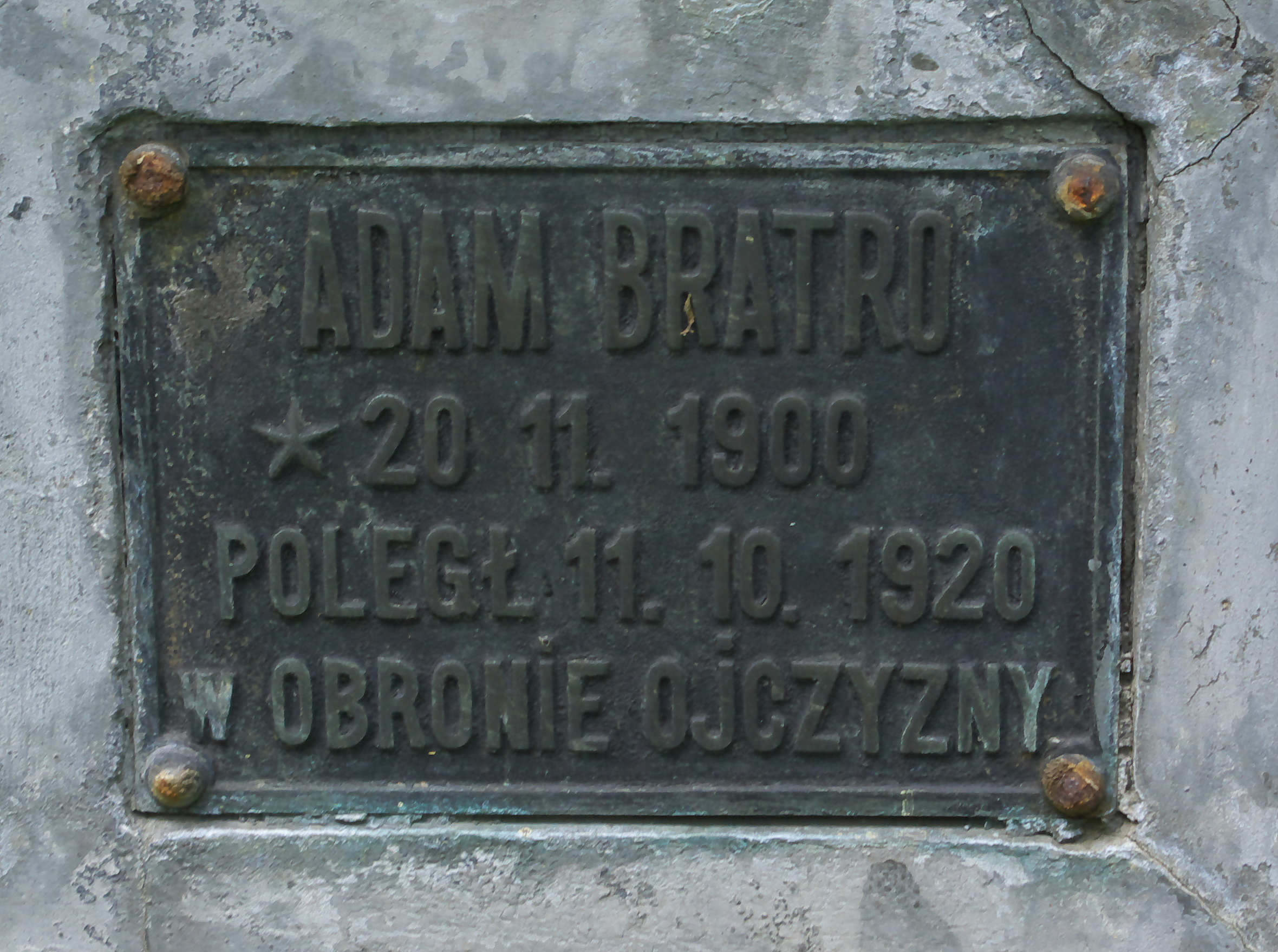 Grobowiec rodziny Bratro na Cmentarzu Centralnym w Sanoku. Spoczywa Adam Antoni Bratro, kawaler Orderu Virtuti Militari